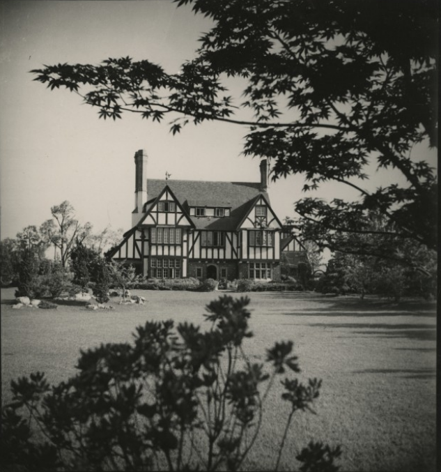 Hudec ház. Sanghaj, Kína. Ismeretlen fényképész felvétele. A Tudor-stílusú, 1930-ban épült Hudec-ház, az építész családjának második sanghaji lakhelye, melybe három gyermekének megszületése után költöztek, és 1938-ig éltek ott.